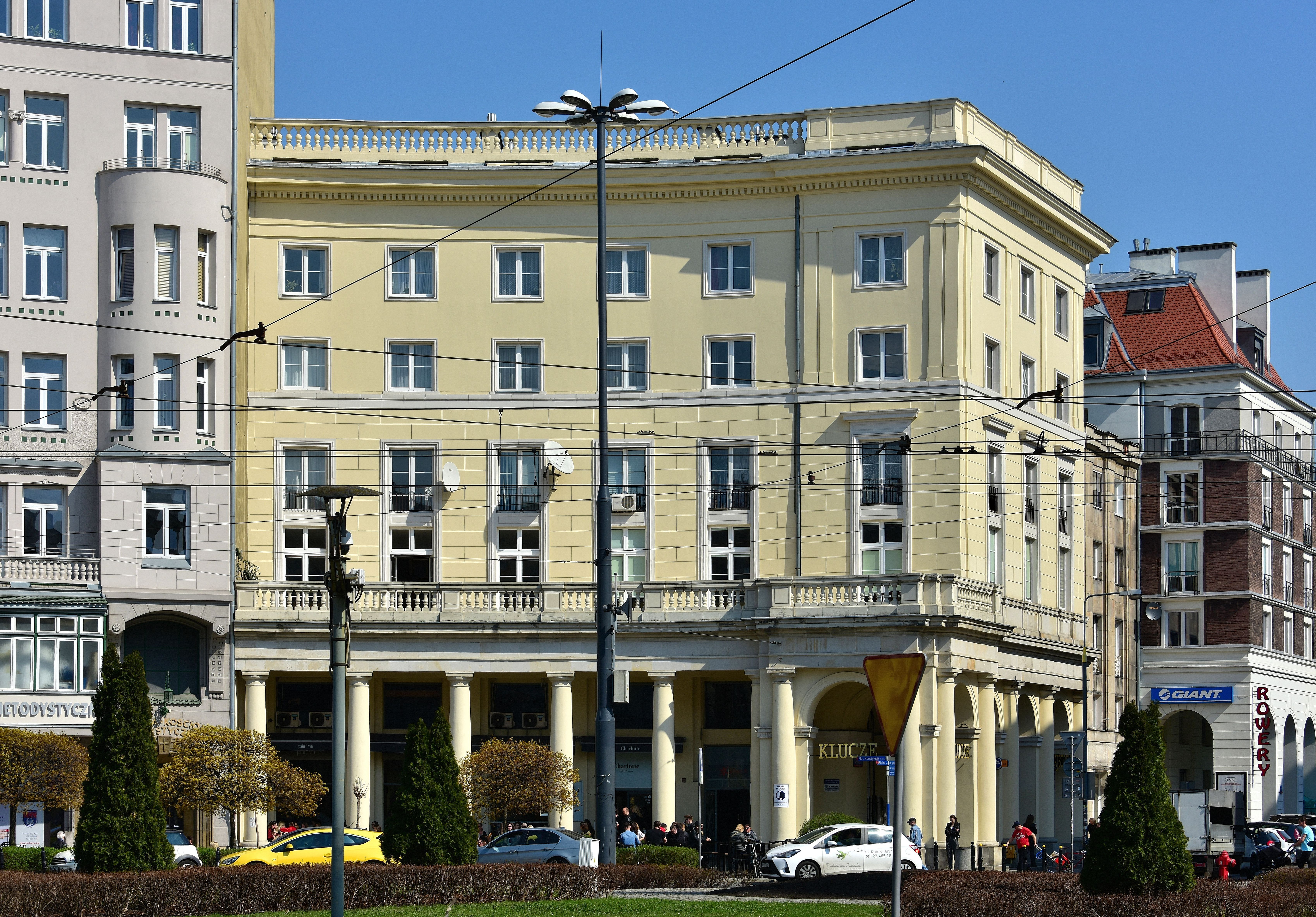 Budynek przy al. Wyzwolenia 18 w Warszawie (widok od strony placu Zbawiciela)